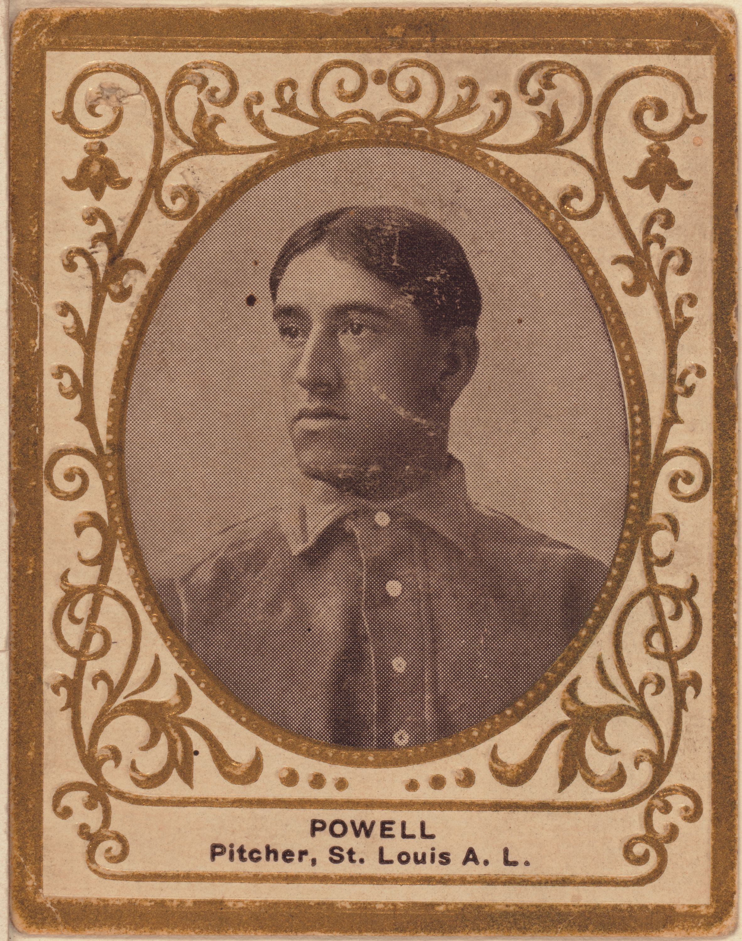 Jack Powell